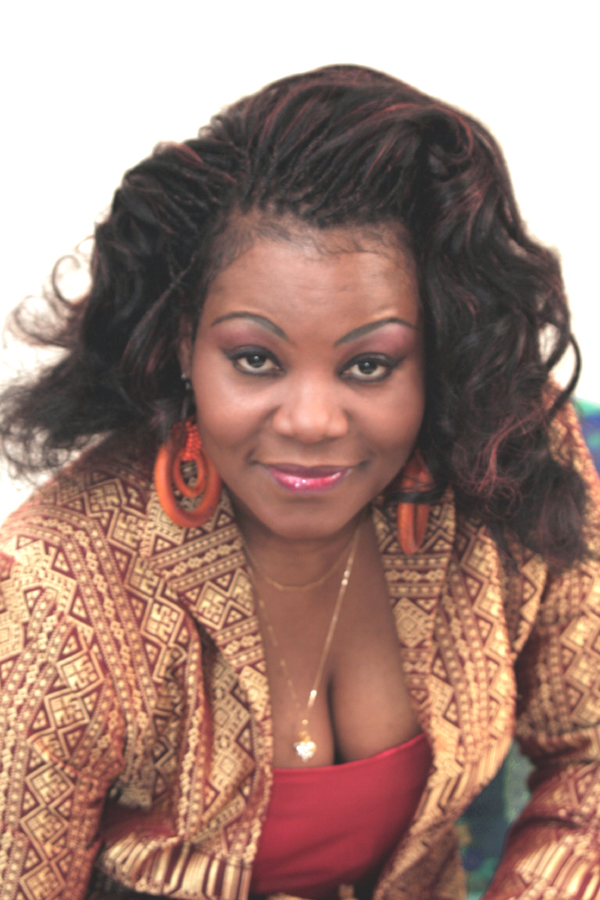 La chanteuse Adé Liz